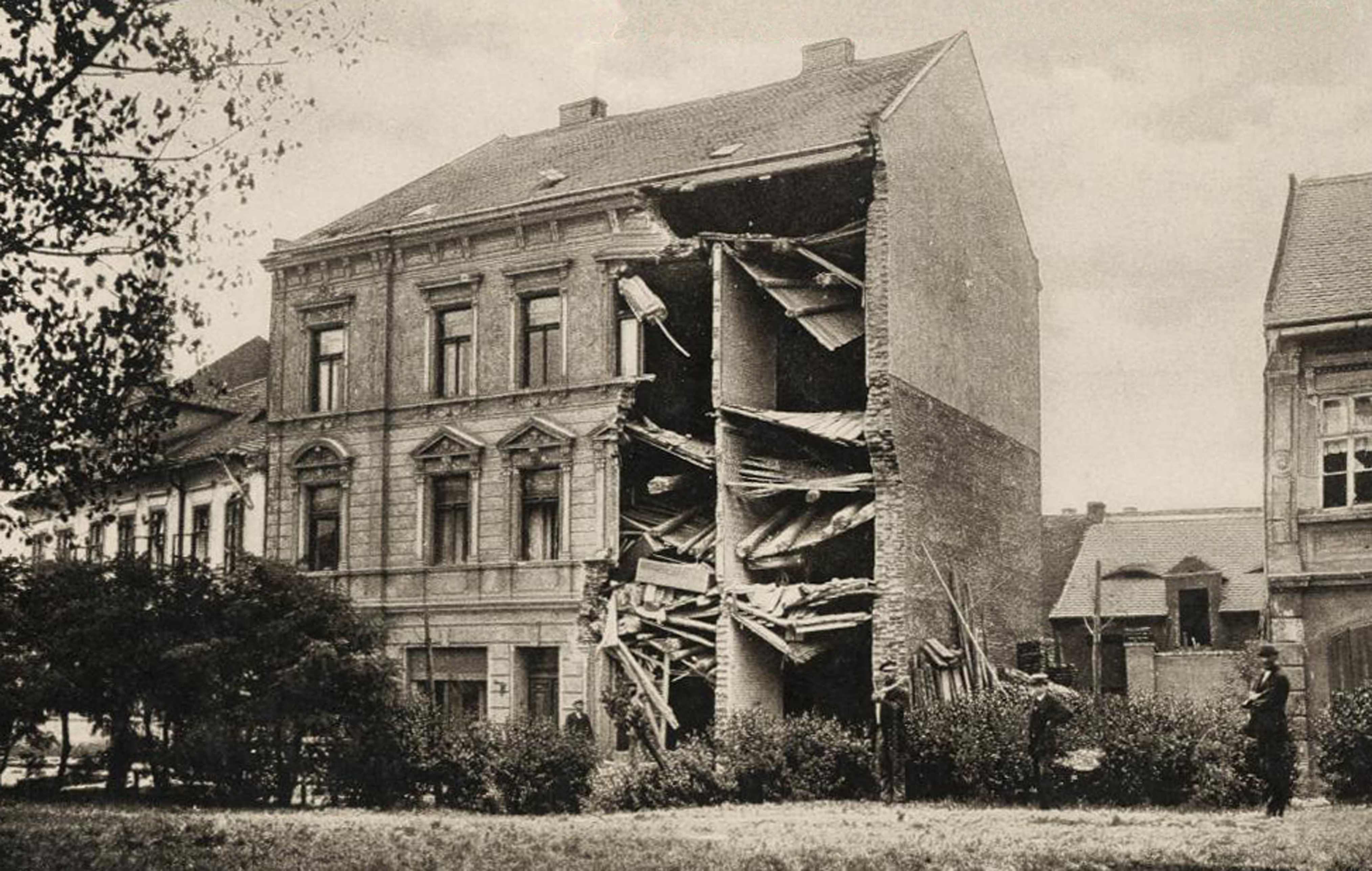 Schwimmsandkatastrophe in Most (Brüx) 1895